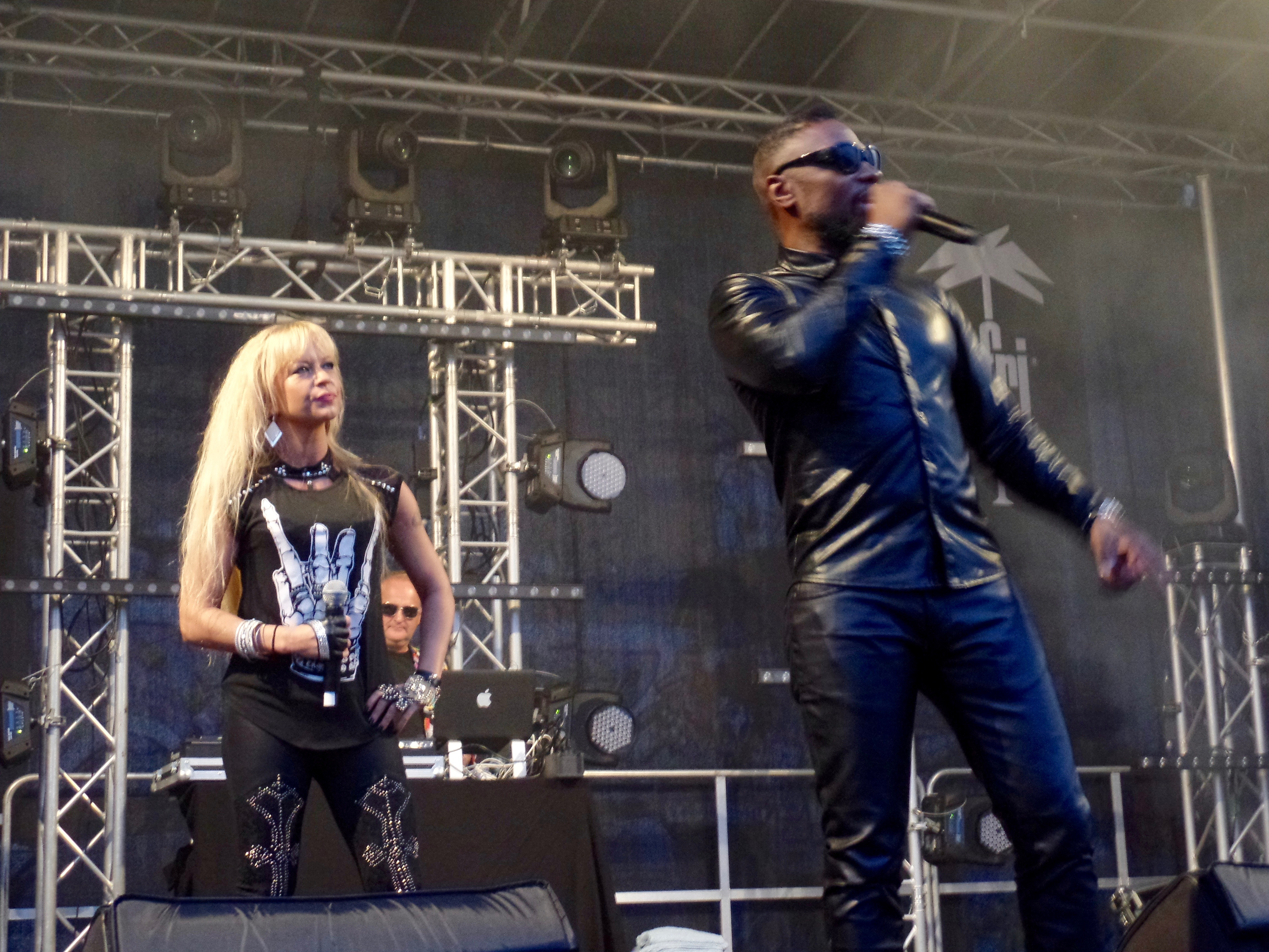 The 90s Open Air mit den Vengaboys und Captain Hollywood Project auf dem Utkiek in Oldenburg am 12. August 2016.